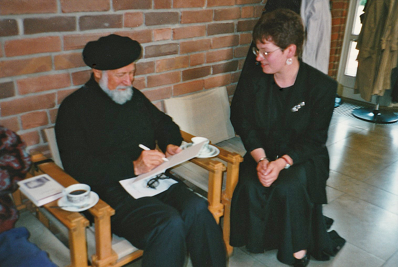 Foto mit dem israelischen Aphoristiker, Lyriker und Rabbiner Elazar Benyoëtz am 2. Mai 1995 nach der Trauerfeier für den Stadtsuperintendenten i.R. Rufus Flügge in der Dietrich-Bonhoeffer-Kirchengemeinde in Hannover-Roderbruch ...